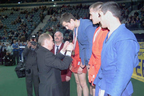 САНКТ-ПЕТЕРБУРГ. Вручение наград победителям турнира чемпионата России по борьбе самбо в городском Ледовом дворце.